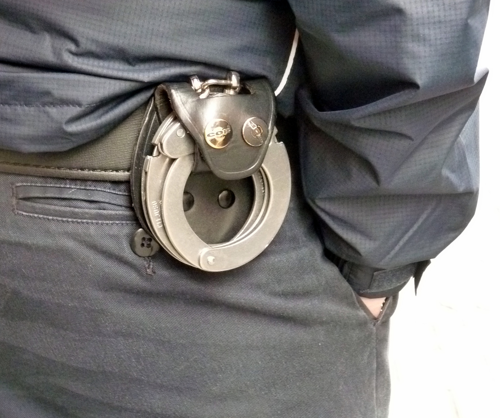 Bonner Polizistin mit Handschellen Modell Clejuso (Clemen und Jung, Solingen) in Handfesselholster Handcuff Pouch Cop 0500N